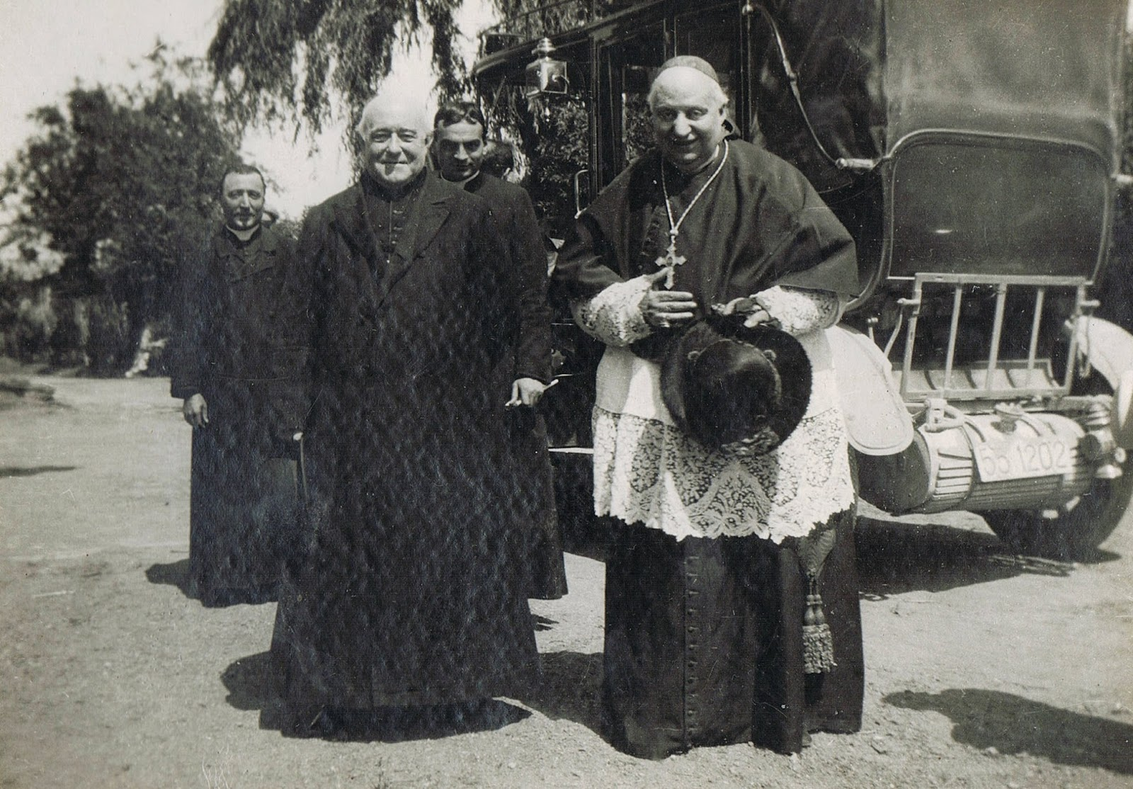 L'historien Louis Duchesne (1843-1922) et le cardinal de la curie romaine Francesco di Paola Cassetta (1841-1919), collection Marie-Anne Miniac.